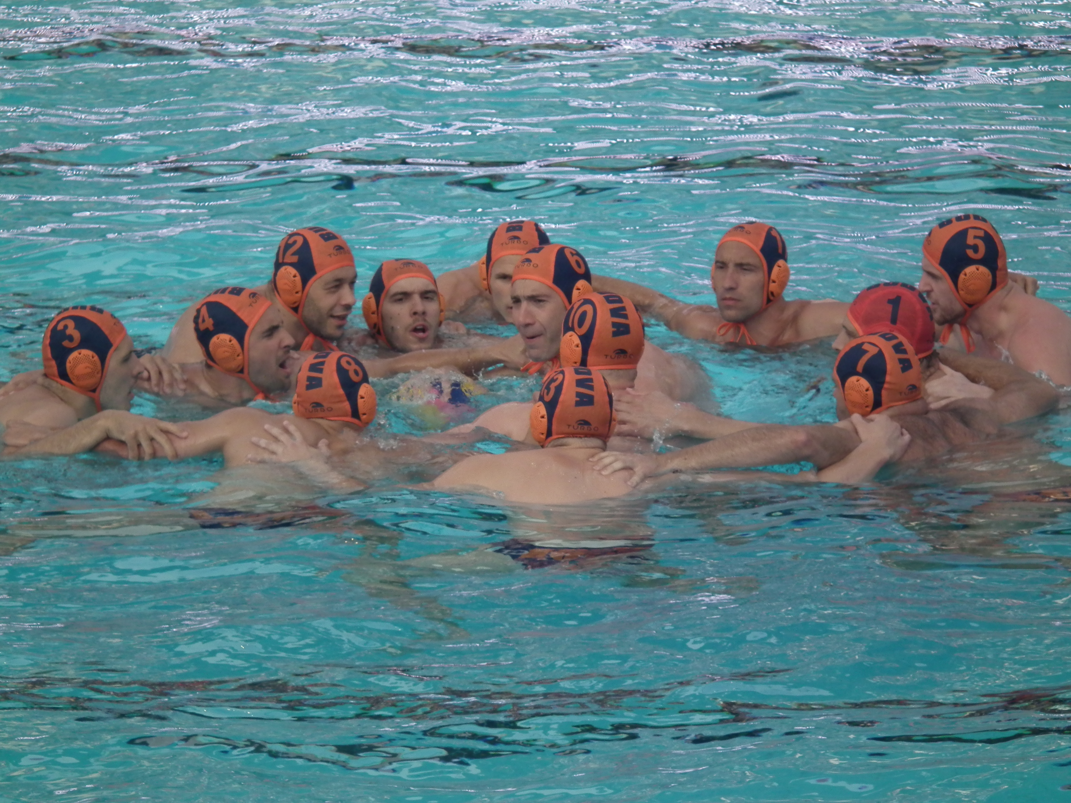 L'urlo del Budva prima della finale per il terzo posto